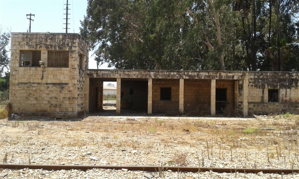 תחנת הרכבת חדרה מזרח - בניין ראשי